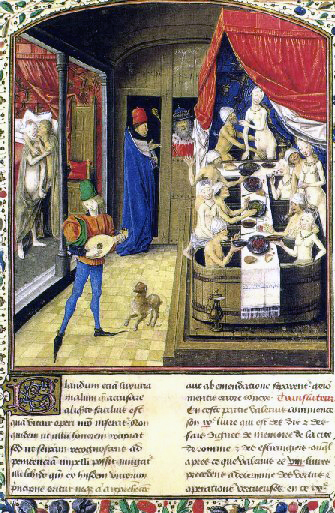 Szene in einem mittelalterlichen Badehaus mit Musikant